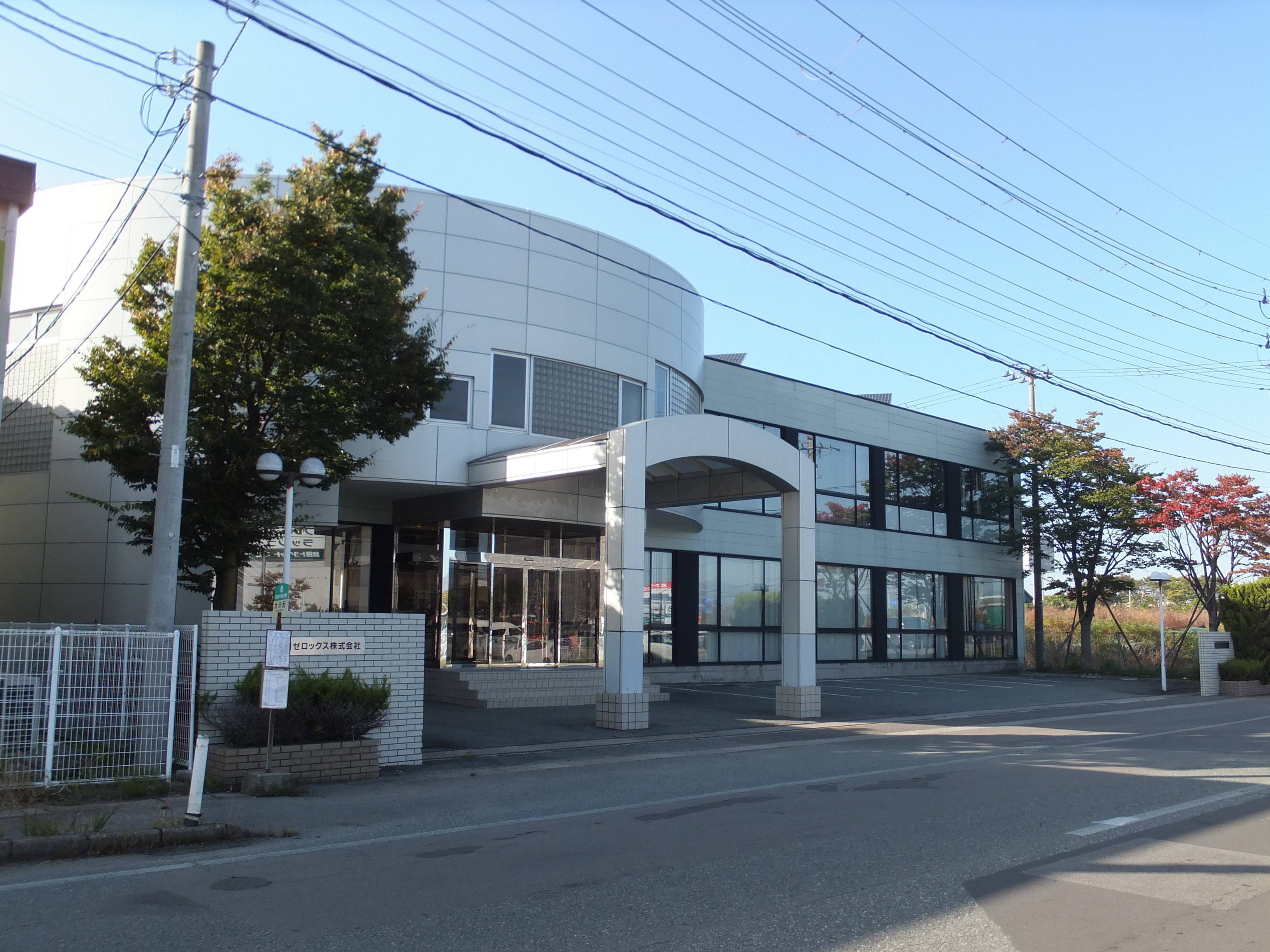 秋田ゼロックス （秋田市川尻町字大川反）